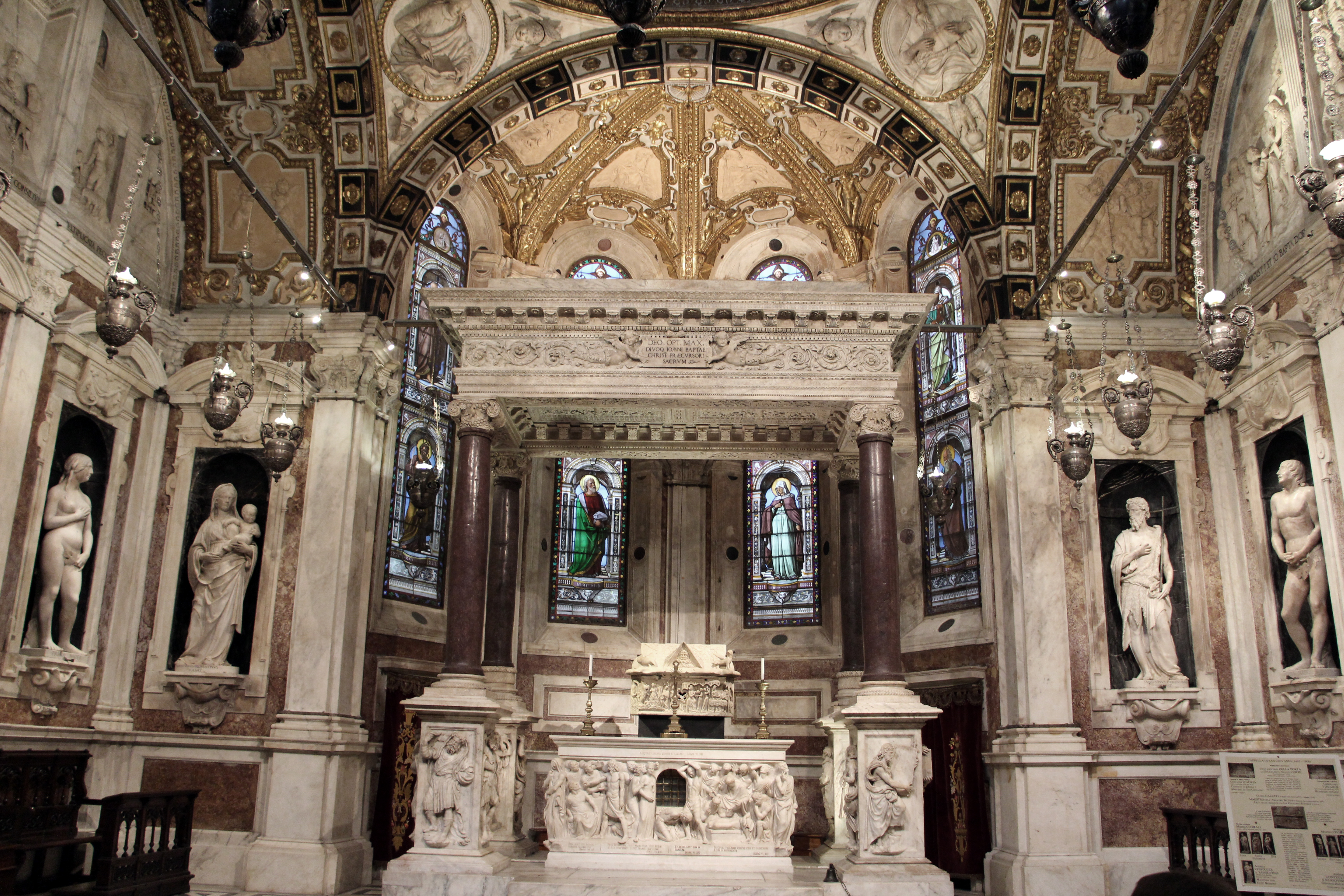 San Lorenzo (Genova) - Cappella di San Giovanni